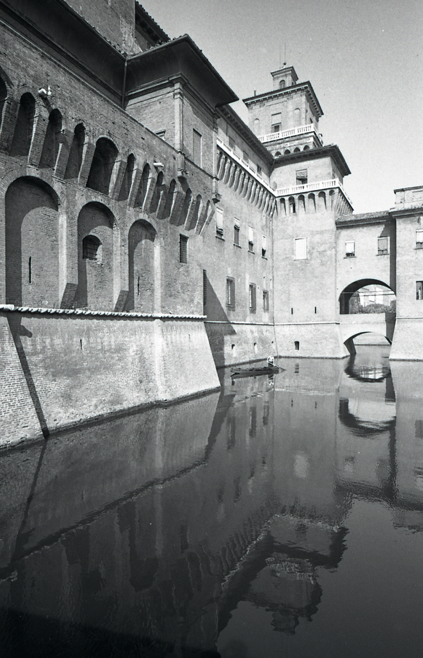 Servizio fotografico : Ferrara, 1965 / Paolo Monti. - Strisce: 6, Fotogrammi complessivi: 35 : Negativo b/n, gelatina bromuro d'argento/ pellicola ; 35 mm. - ((I fotogrammi hanno una doppia numerazione. - Sul portanegativi: Leica Adox 21. - Sul dorsodel portanegativi monti specifica: "Particolari facciata cattedrale. Castello. Cortile ed esterni. Casa Romei. Università. Piazza Ariostea, ecc.". - Occasione: Pubblicazione: "Emilio CECCHI, Natalino SAPEGNO (a cura di), Storia della Letteratura Italiana, 9 voll., Milano, Garzanti, 1966 e segg."